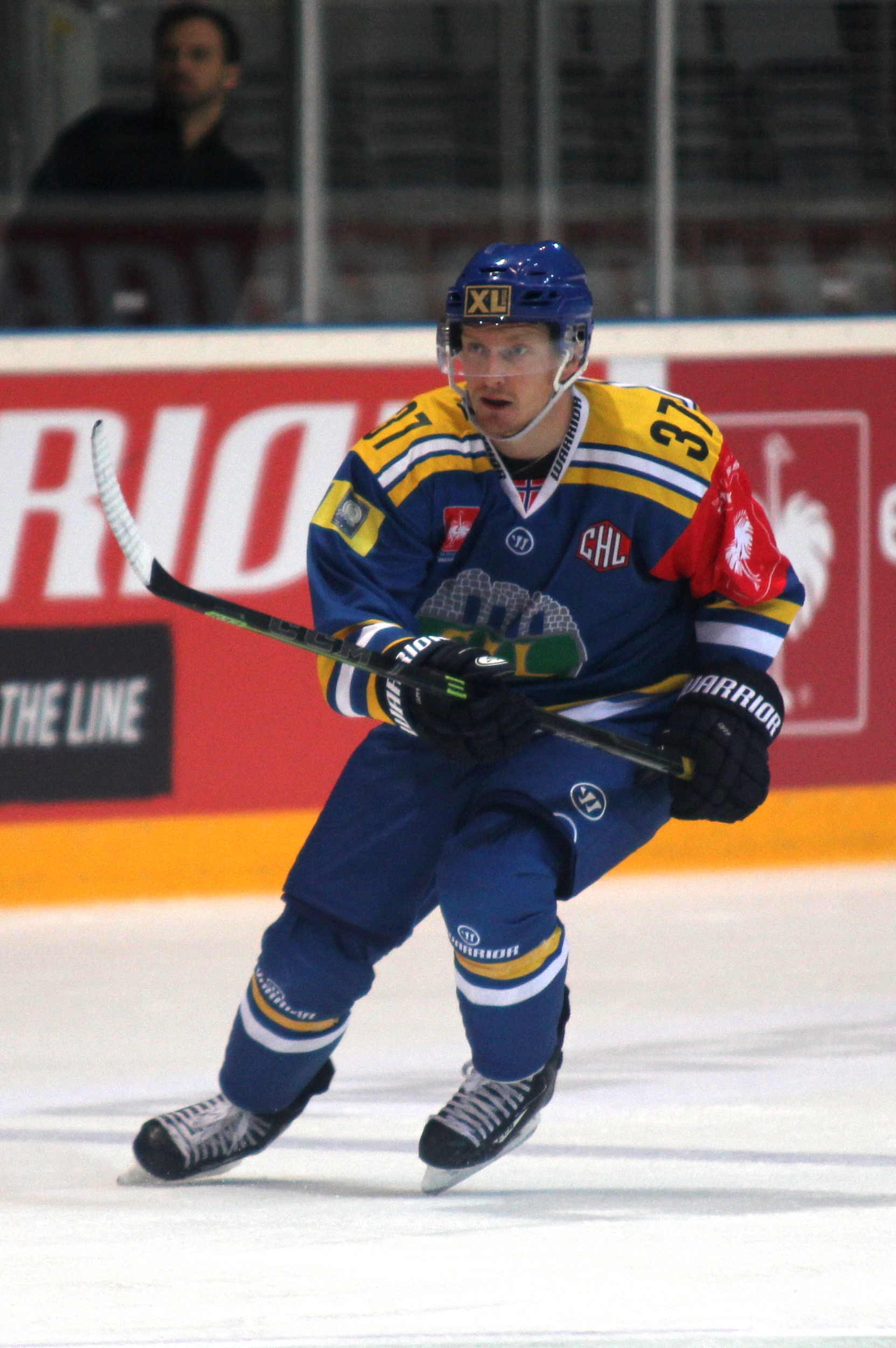 Lars Løkken Østli (H 37).